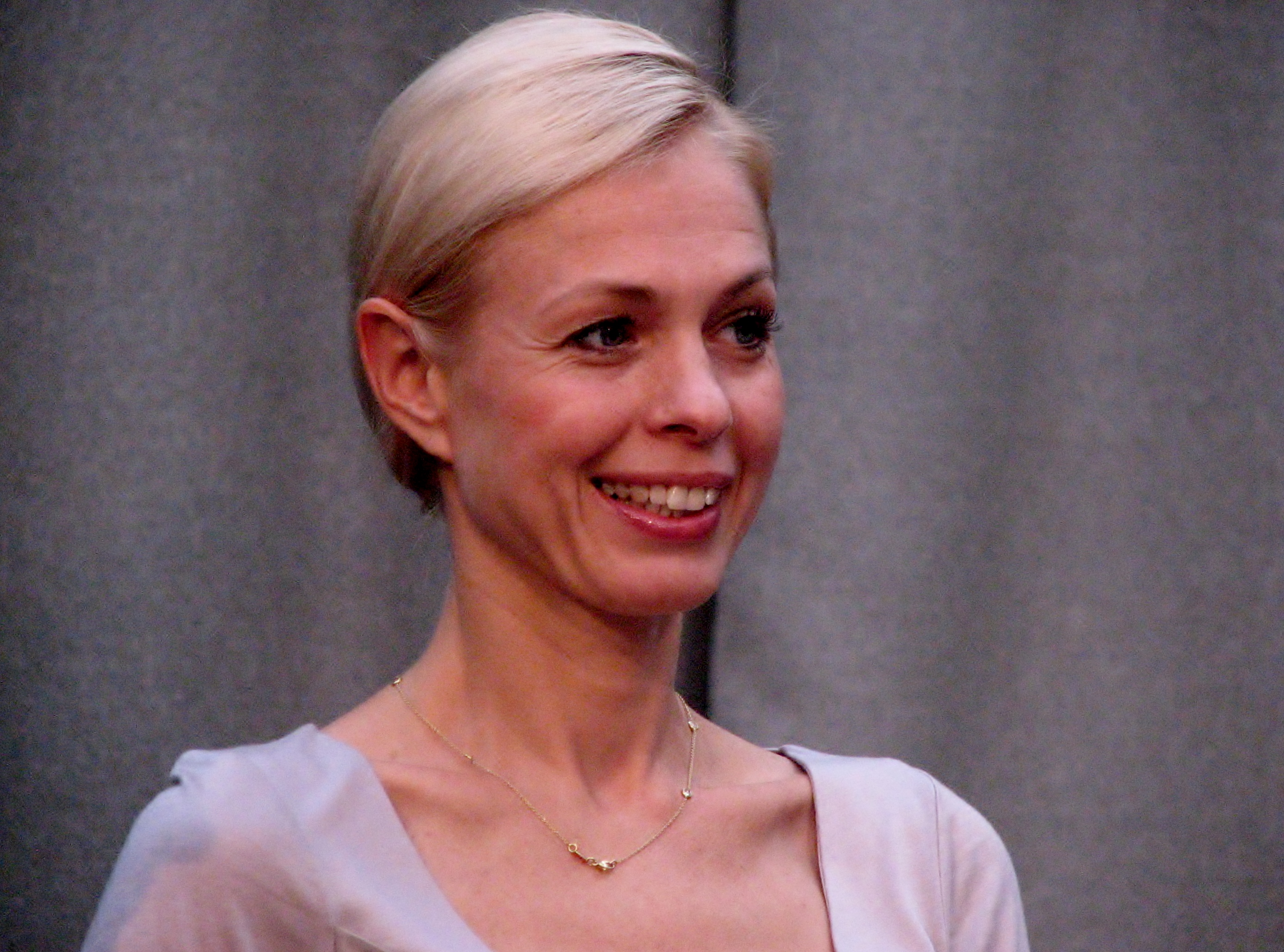 Age Oks autogrammitunnis Estonia talveaias